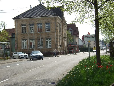 Rathaus Haueneberstein. Nordwest Ansicht.